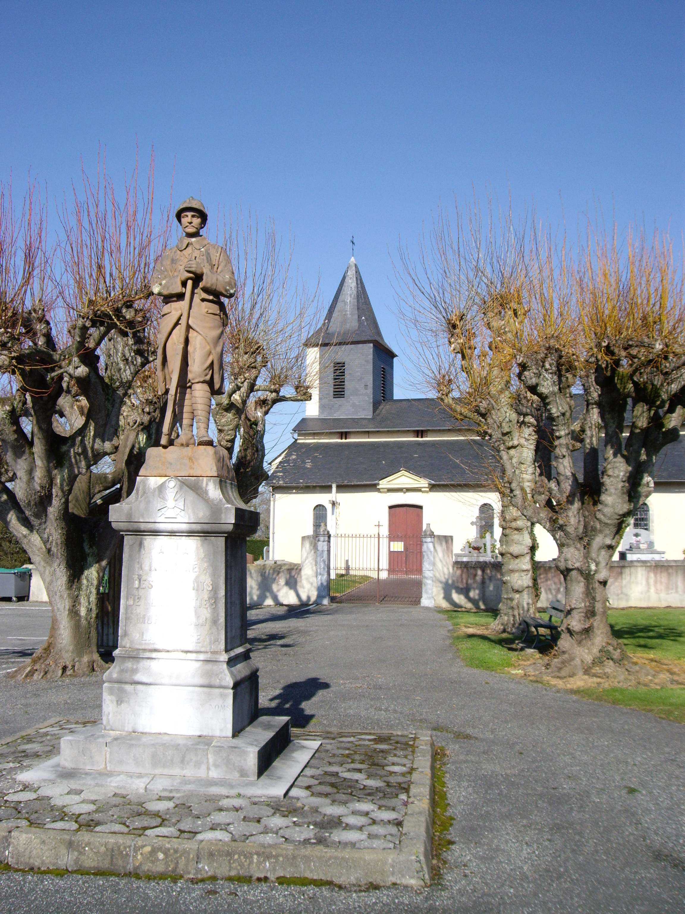 Monument aux morts et église Saint-Jean-Baptiste de Lourenties (64)